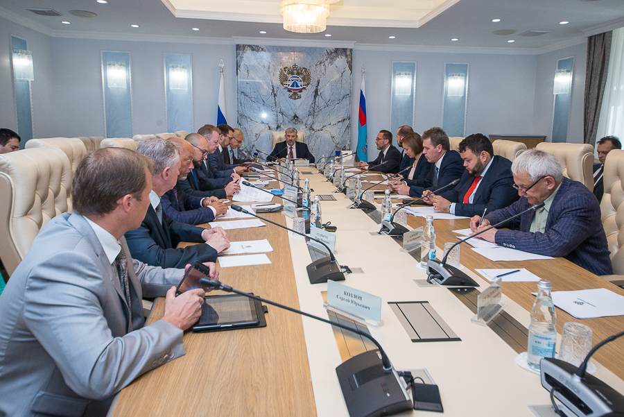 Совещание с представителями субъектов-участников проекта «Безопасные и качественные дороги»